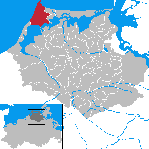 Born a. Darß in Mecklenburg-Vorpommern - District Nordvorpommern